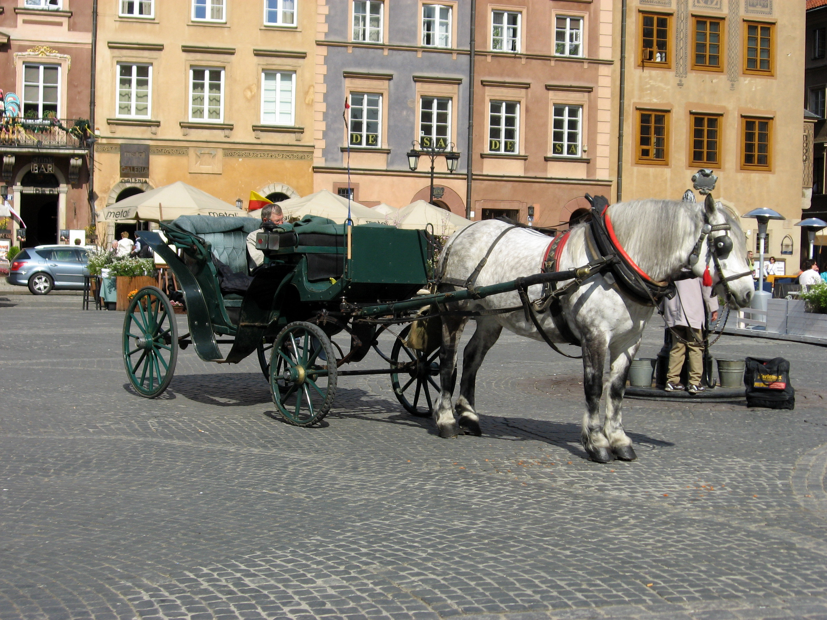 Pferdedroschke (österr. Fiaker) in Warschau, Polen.